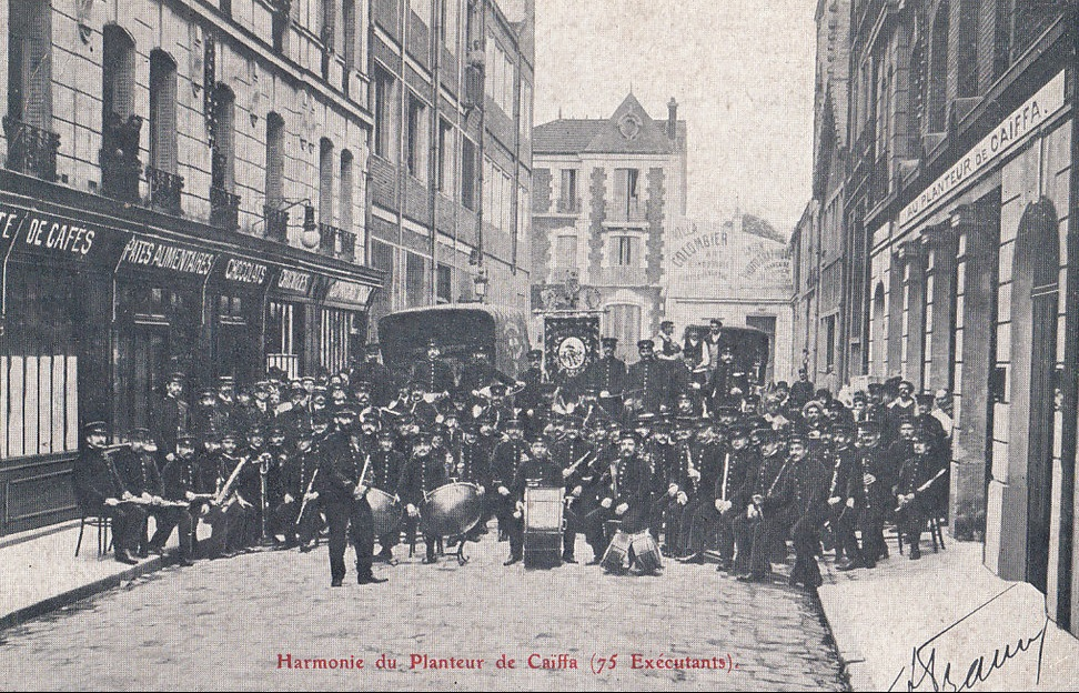 Fanfare de la firme Au Planteur de Caïffa, vers 1905-1910. Carte postale d'époque.